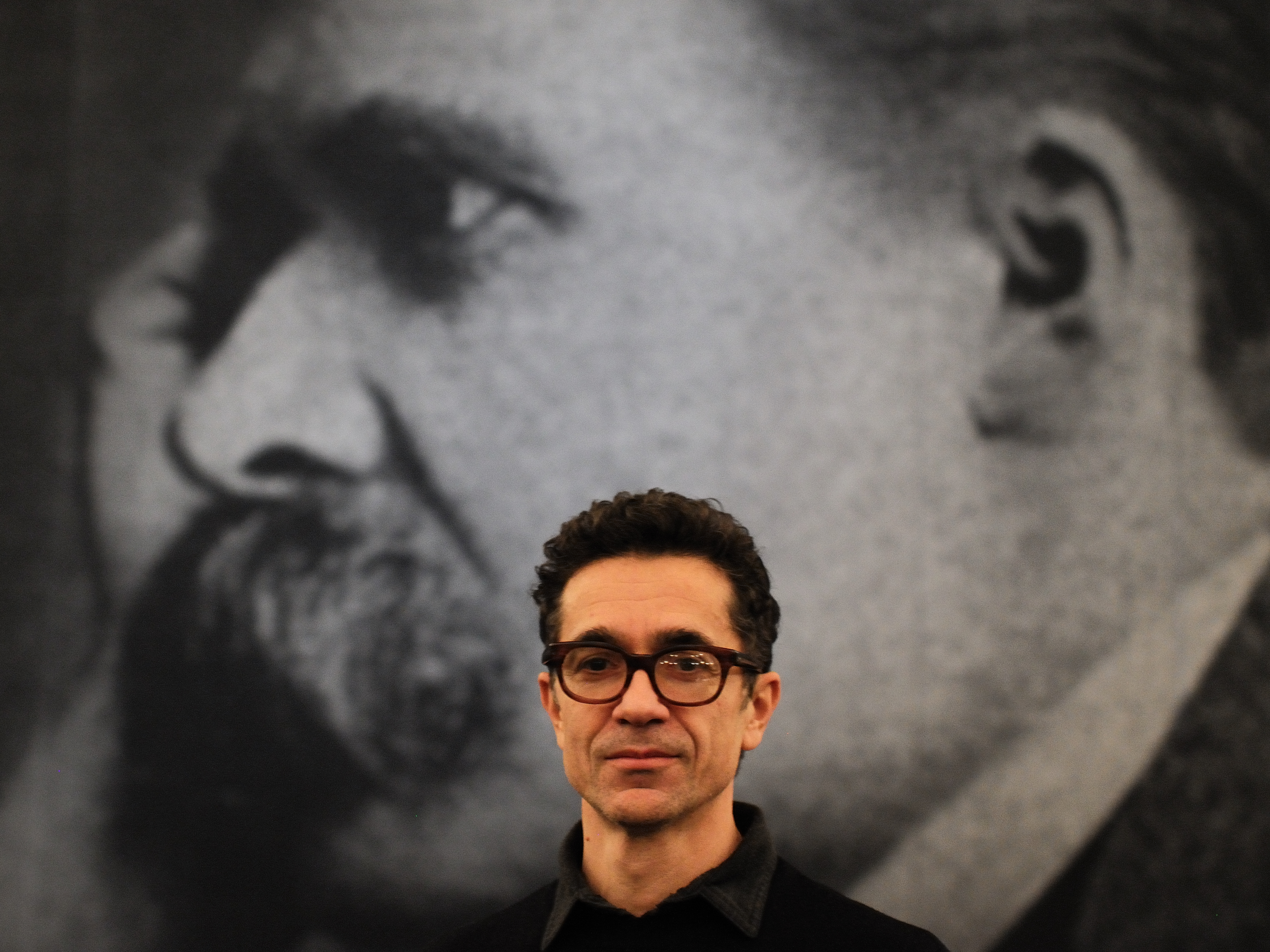 Il regista Romeo Castellucci al Teatro Comunale di Bologna. Sfondo sipario tulle del Parsifal